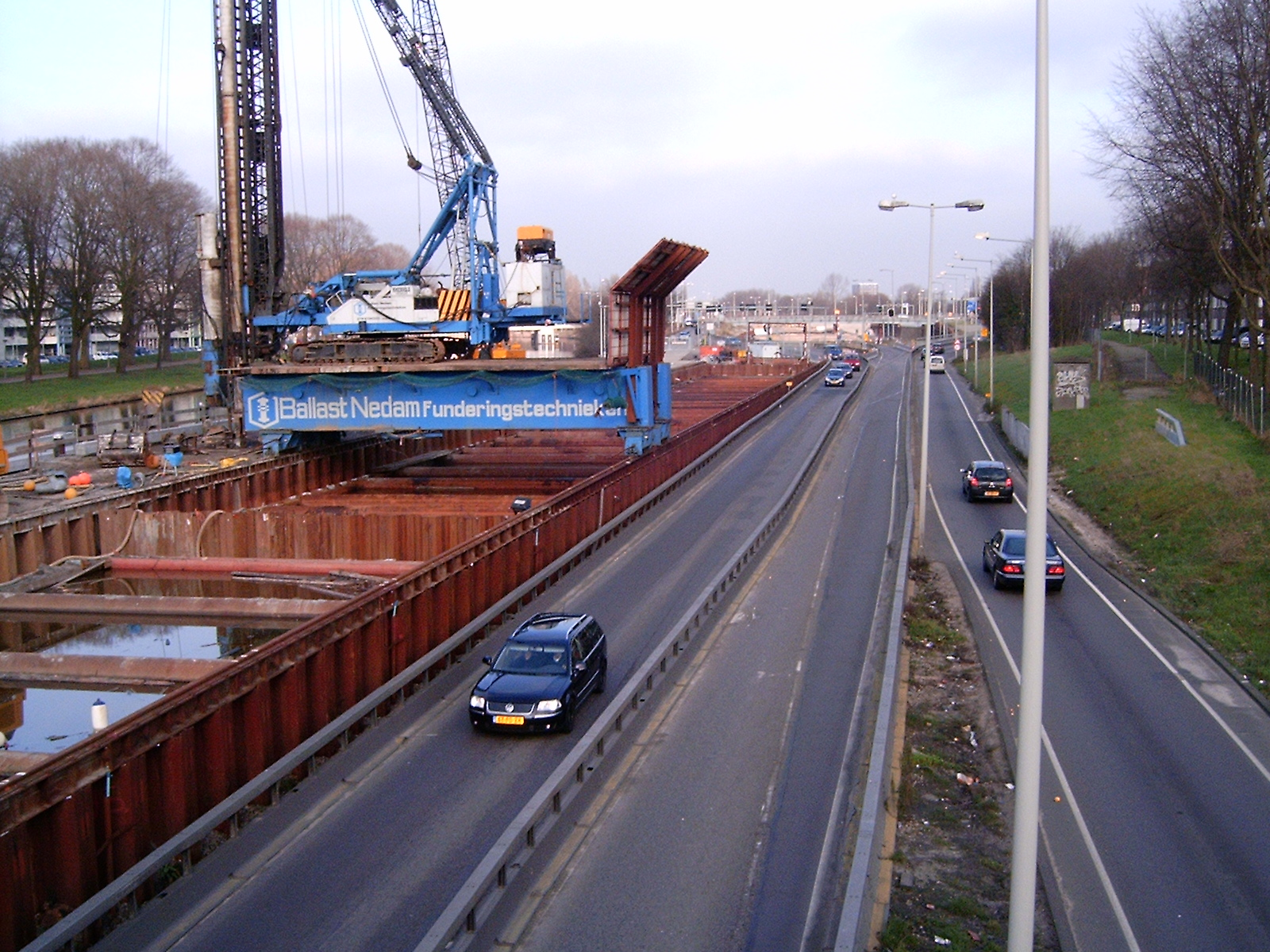 Noorzuidlijn in aanbouw in Amsterdam Noord